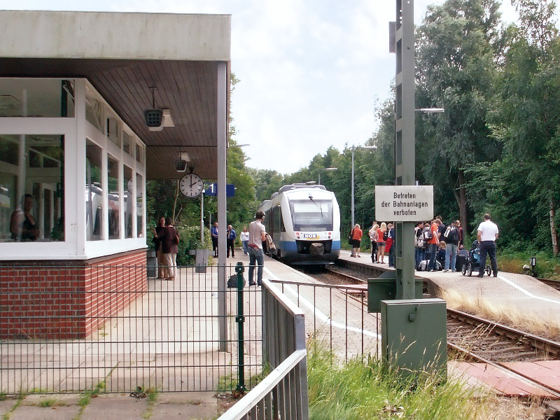 Eiderstedter Bahn